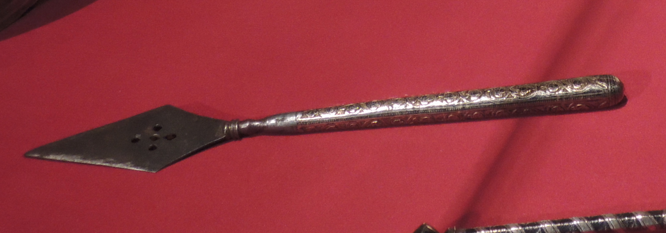 Литургические предметы. Москва, мастерские Кремля, 2-я половина 17 века. Серебро, чеканка, резьба, чернь, золочение. ММК. Потир, дискос, звездица, тарель, копие и лжица составляют группу богослужебных предметов, которые используются во время литургии.